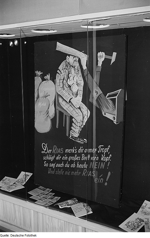 Original image description from the Deutsche Fotothek Schaukasten mit Propaganda gegen den Rundfunksender Rias